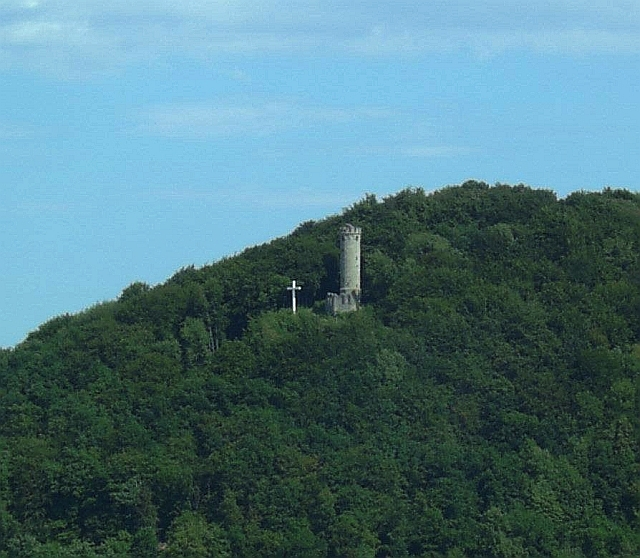 Bilsteinturm in Marsberg, Germany.